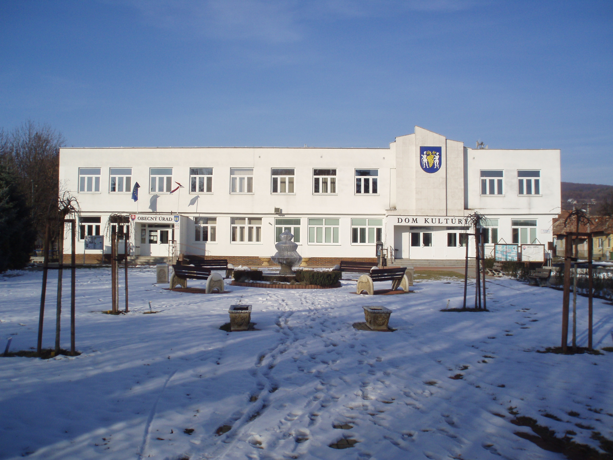 obecný úrad, Rybník okres Levice